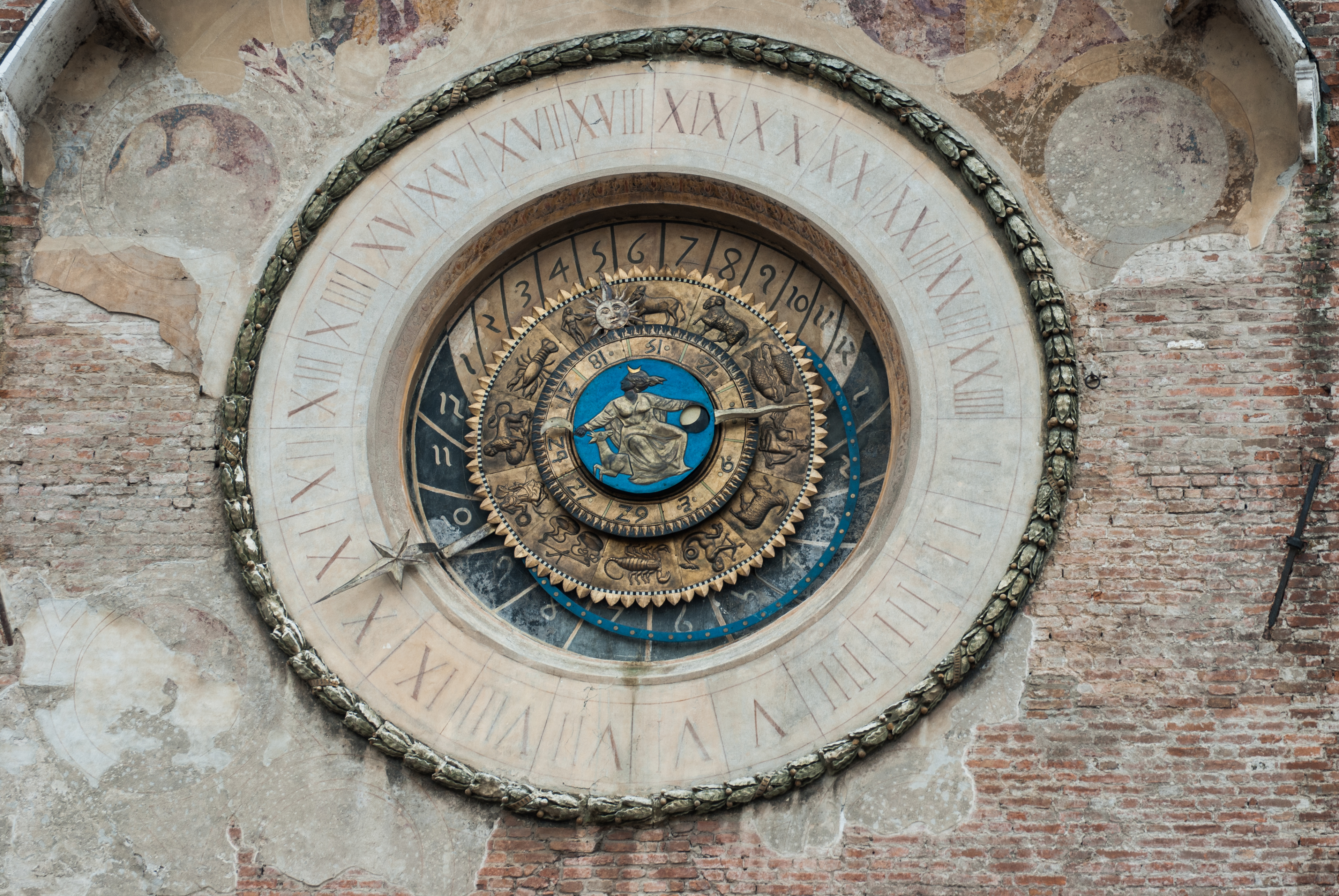 Orologio sul Torre dell_Orologio a Mantova